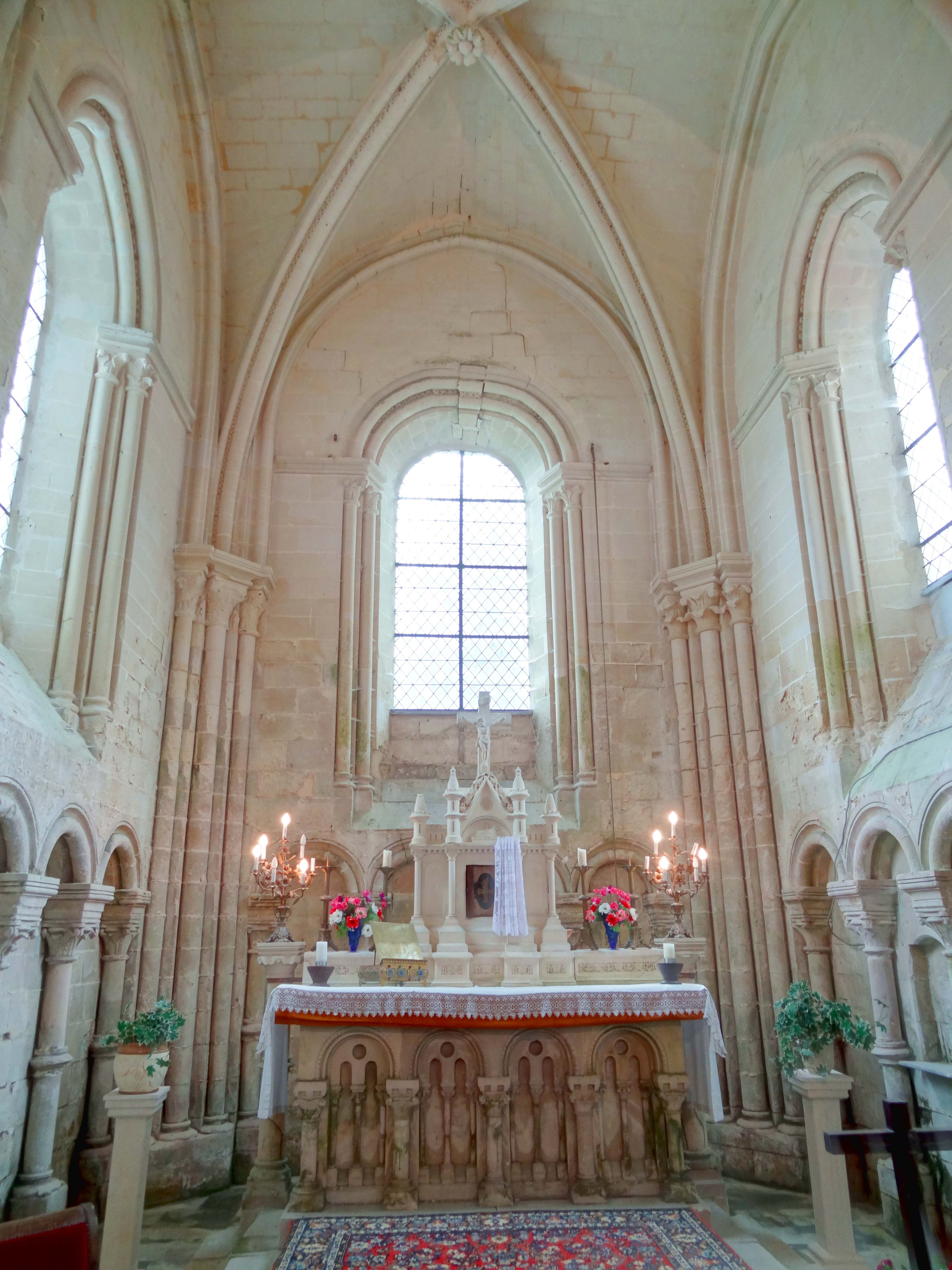 Intérieur de l'église - voir titre.